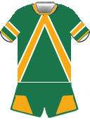 Cairns Cyclones 1997 jersey